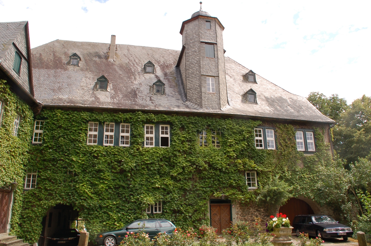 Burg Runkel, Runkel (Lahn), Hessen, Deutschland